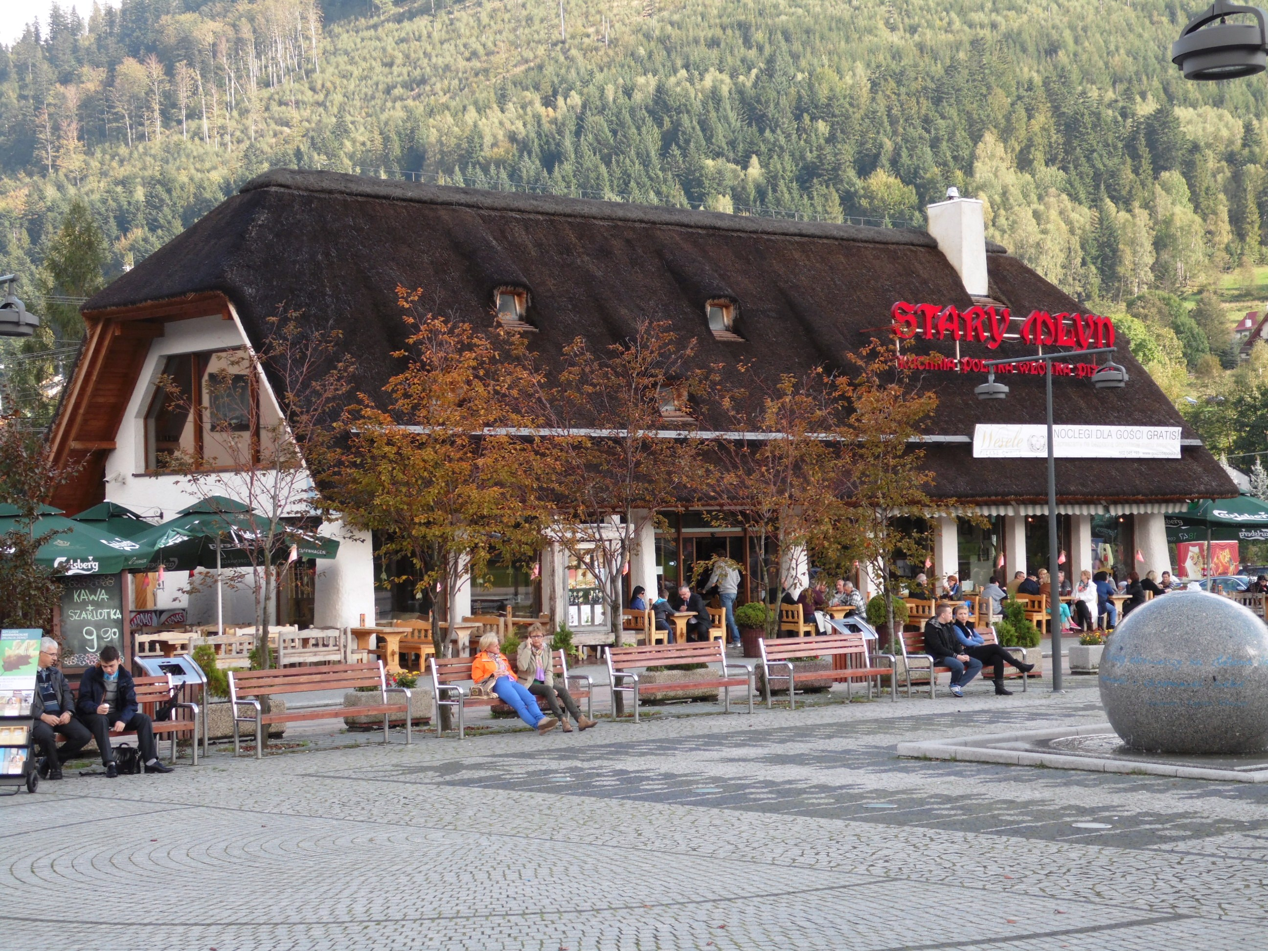 "STARY MŁYN" w Centrum miasteczka.